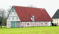 Gebäude Birgland, frankische neben oberpfälzer Baustil